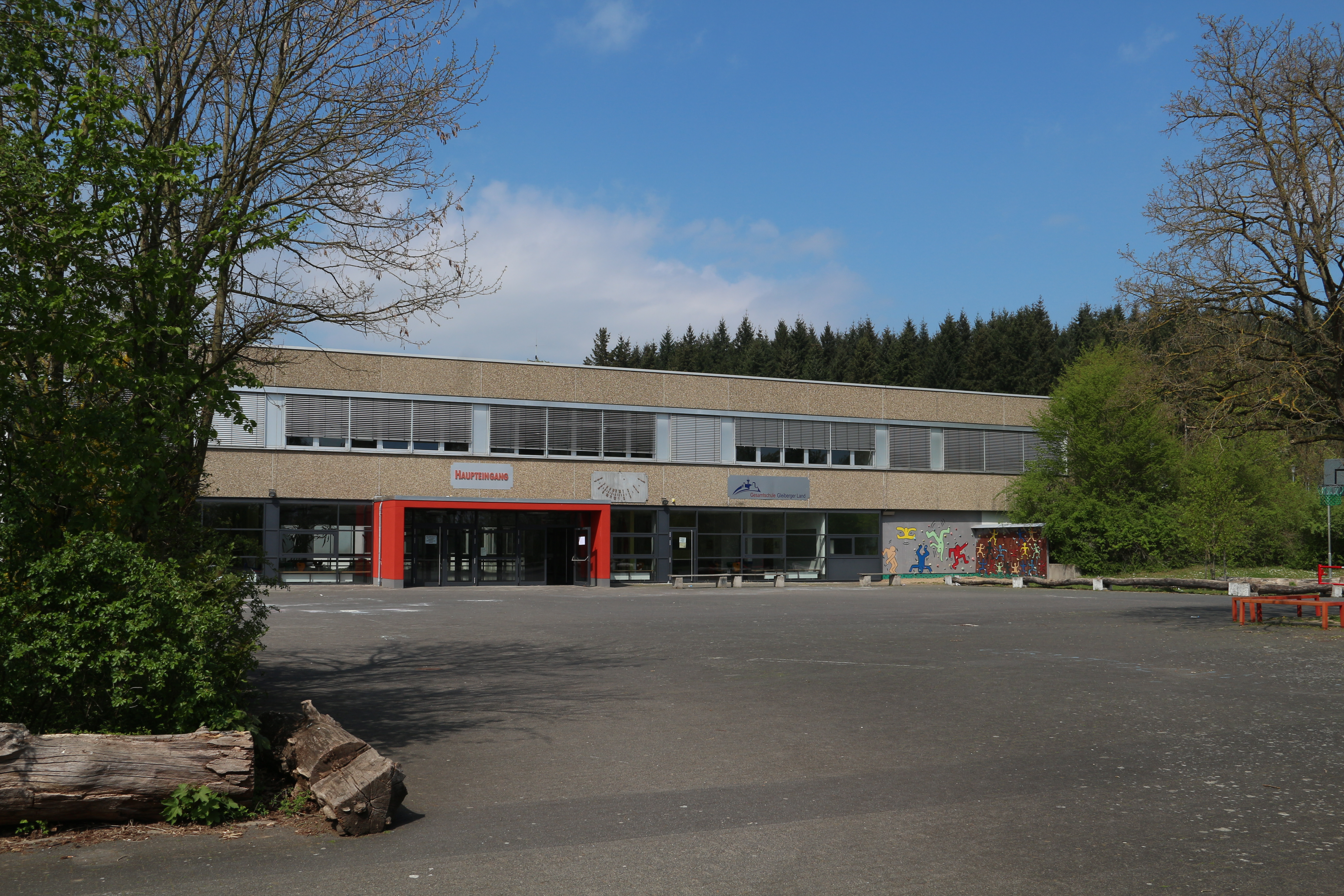 Gesamtschule Gleiberger Land